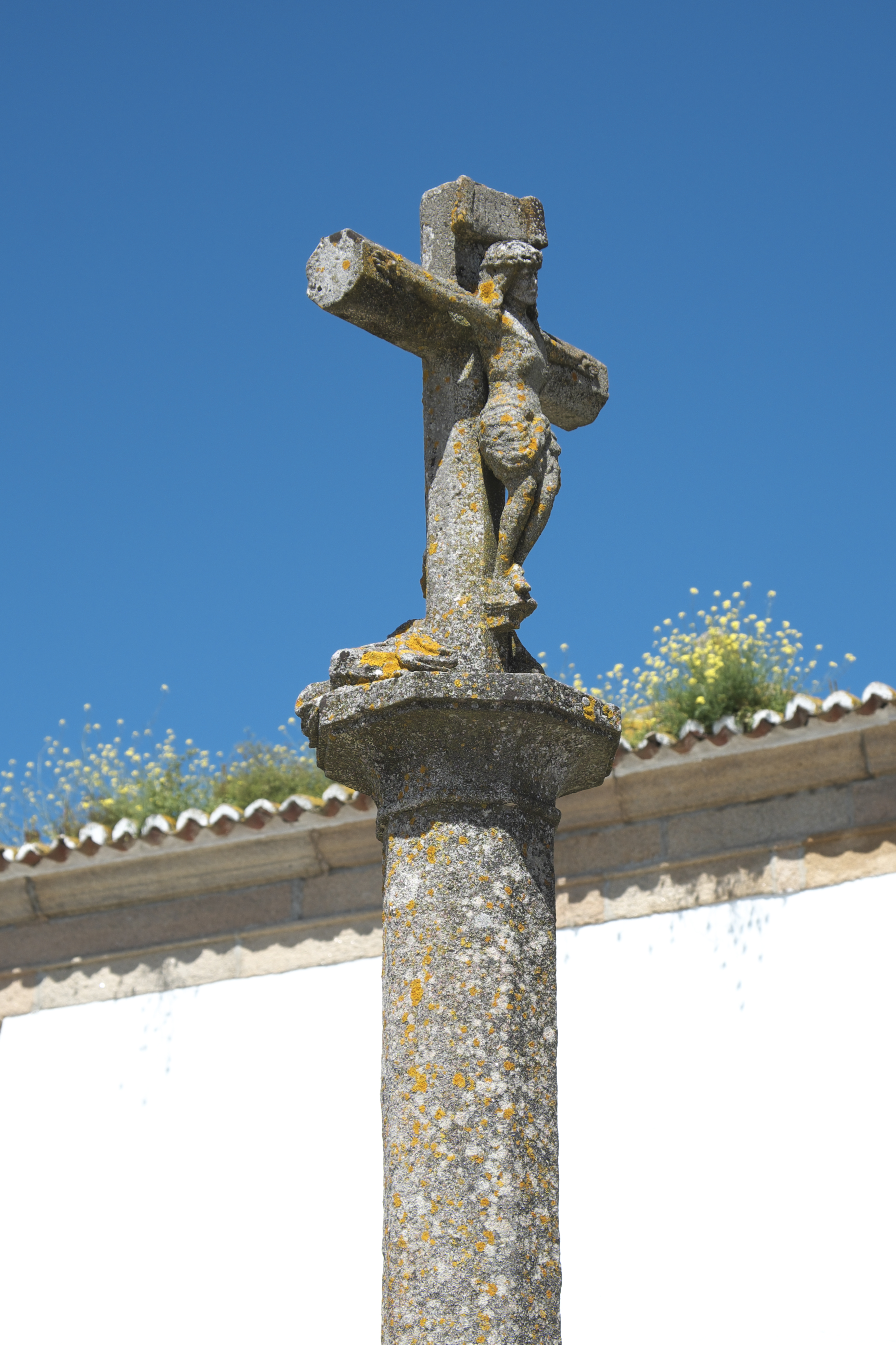 Steinkreuz Cruzeiro de Alpalhão in Alpalhão im Kreis Nisa (Distrikt Portalegre/Portugal)